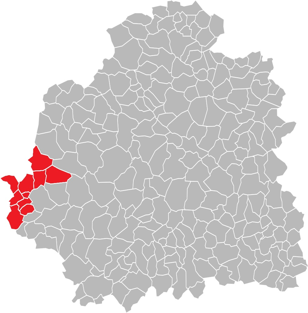 Carte des communes de l'Indre (36) : Le canton de Tournon-Saint-Martin, de 1790 à 2015.